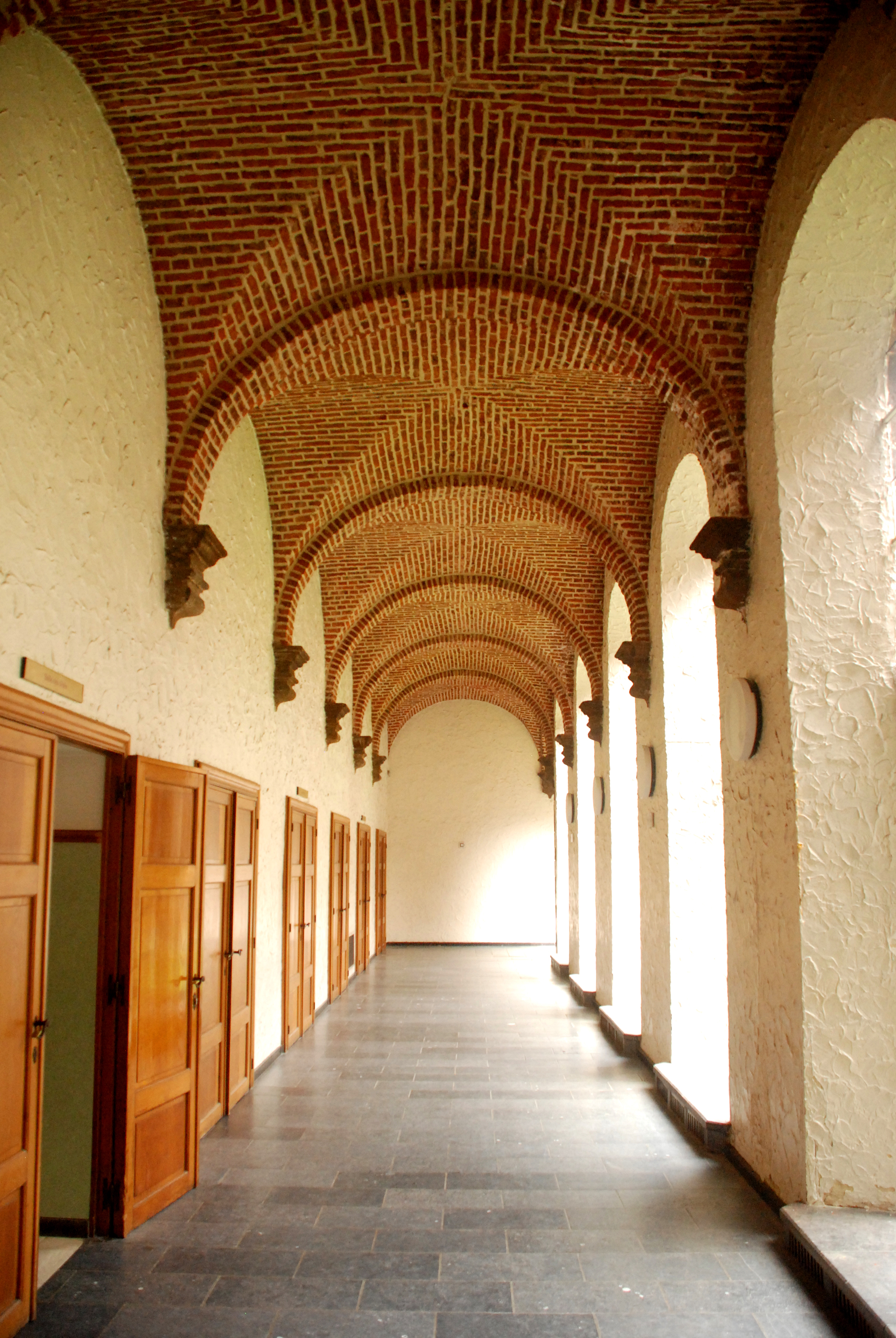 Belgique - Brabant wallon - Ancien couvent des Carmes Chaussés de Wavre